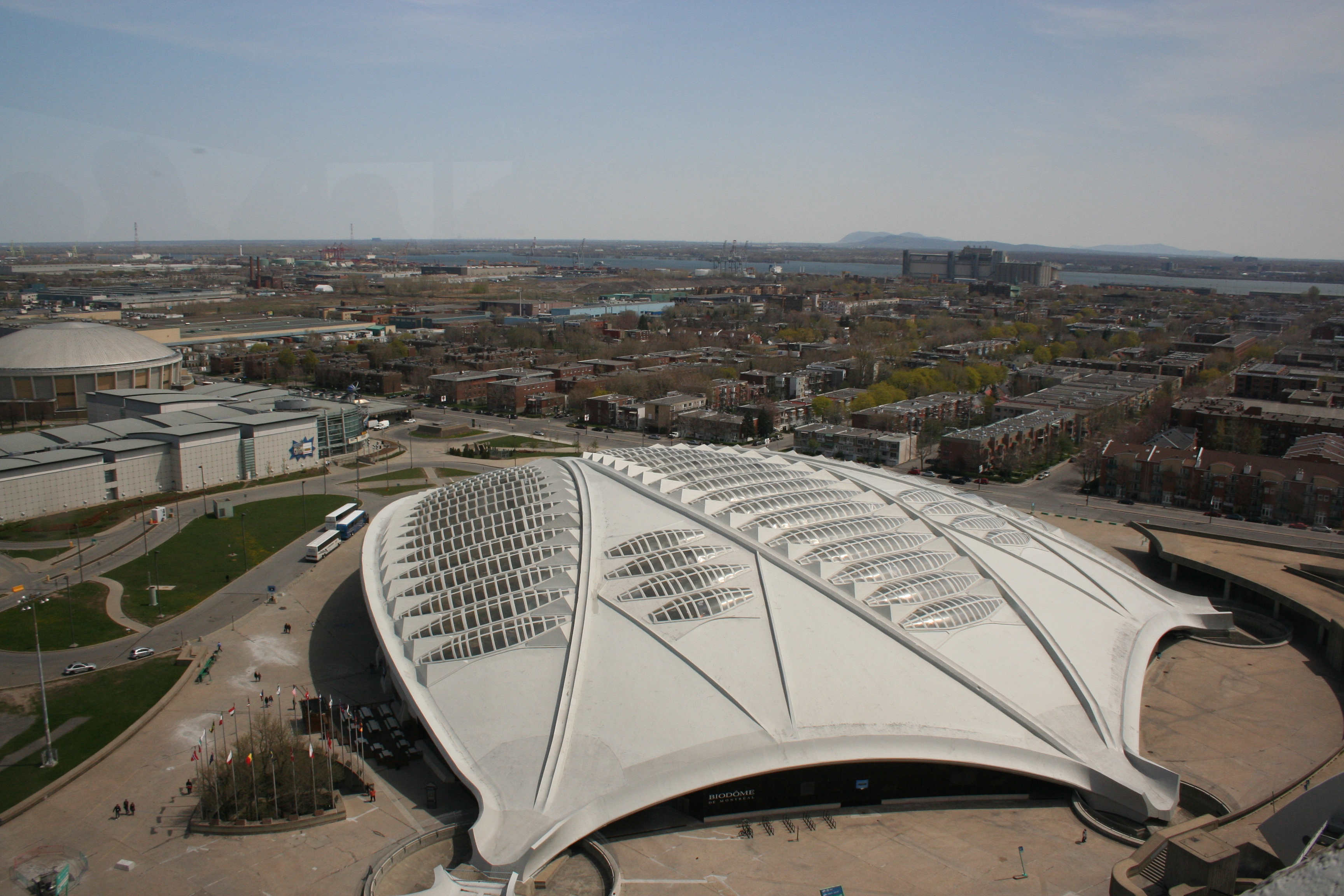 Biodome, Montreal, QC